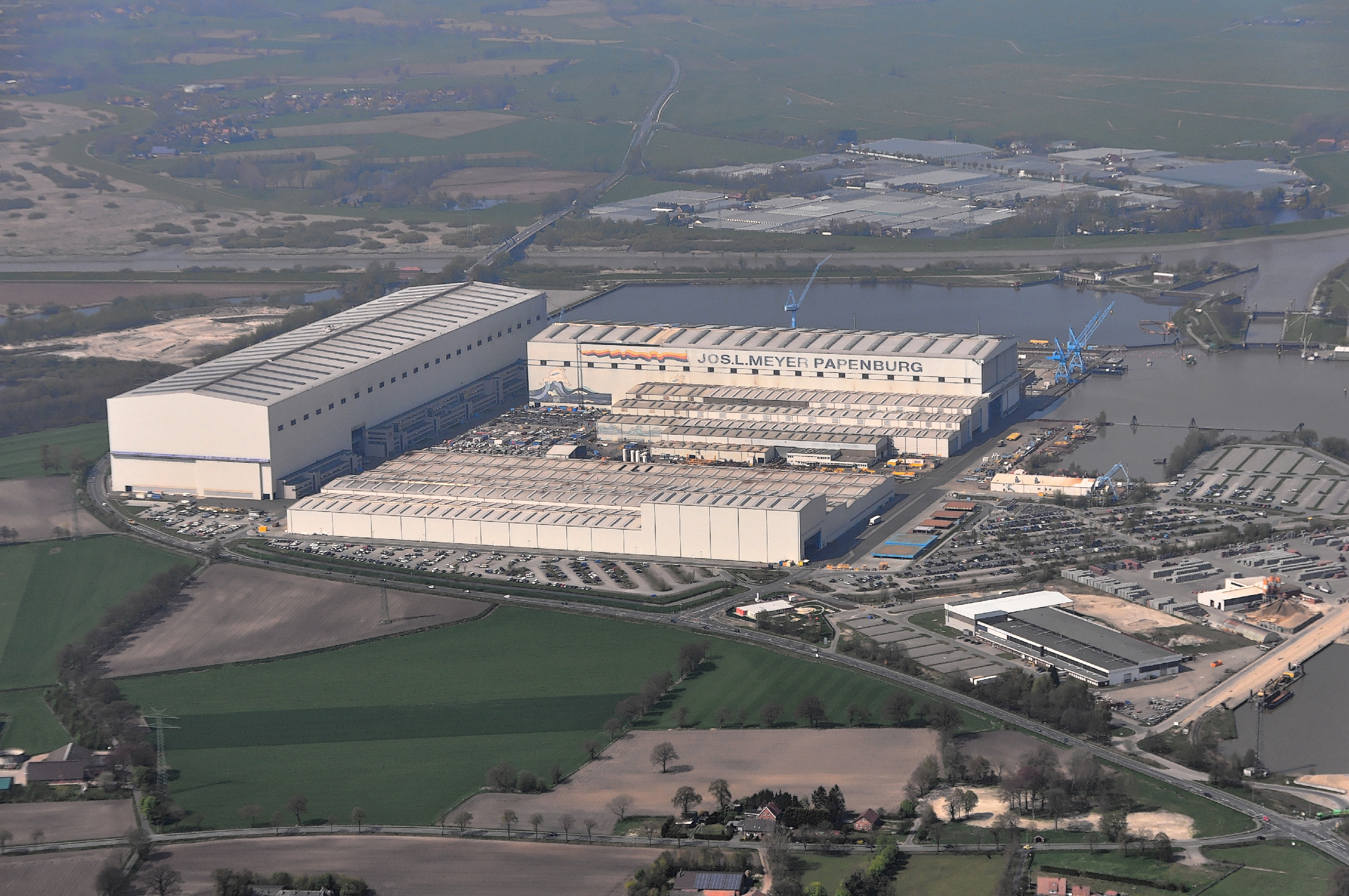 Luftbilder von der Nordseeküste 2013-05